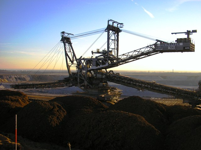 Tagebau Bergheim im April 2008. Der Absetzer 756 übernimmt die Verfüllung des sich in Rekultivierung befindlichen Tagebaus bei Niederaußem.